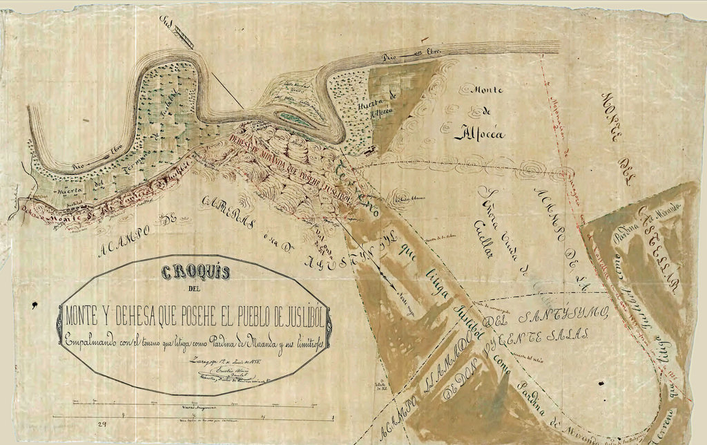 Monte y la dehesa que posee el pueblo de Juslibol, empalmando con el terreno que litiga como Pardina de Miranda y sus limítrofes. 1858.